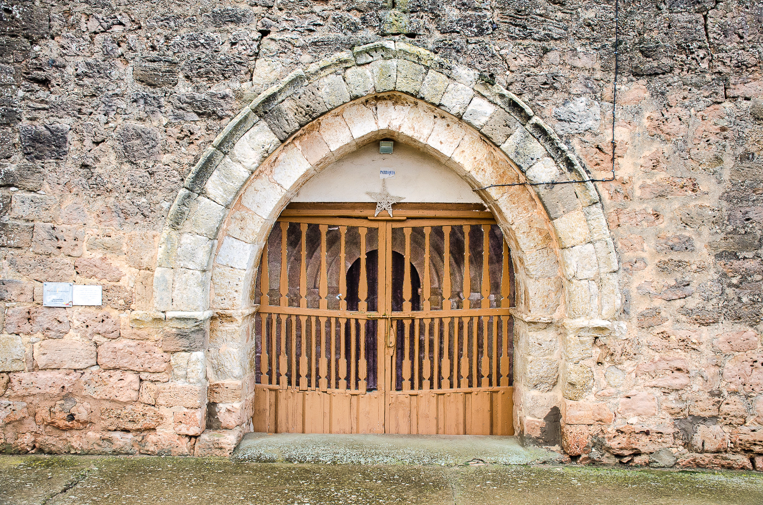 Portada del nártex de la iglesia de San Román mártir, de Quintanilla de Riofresno (Burgos)